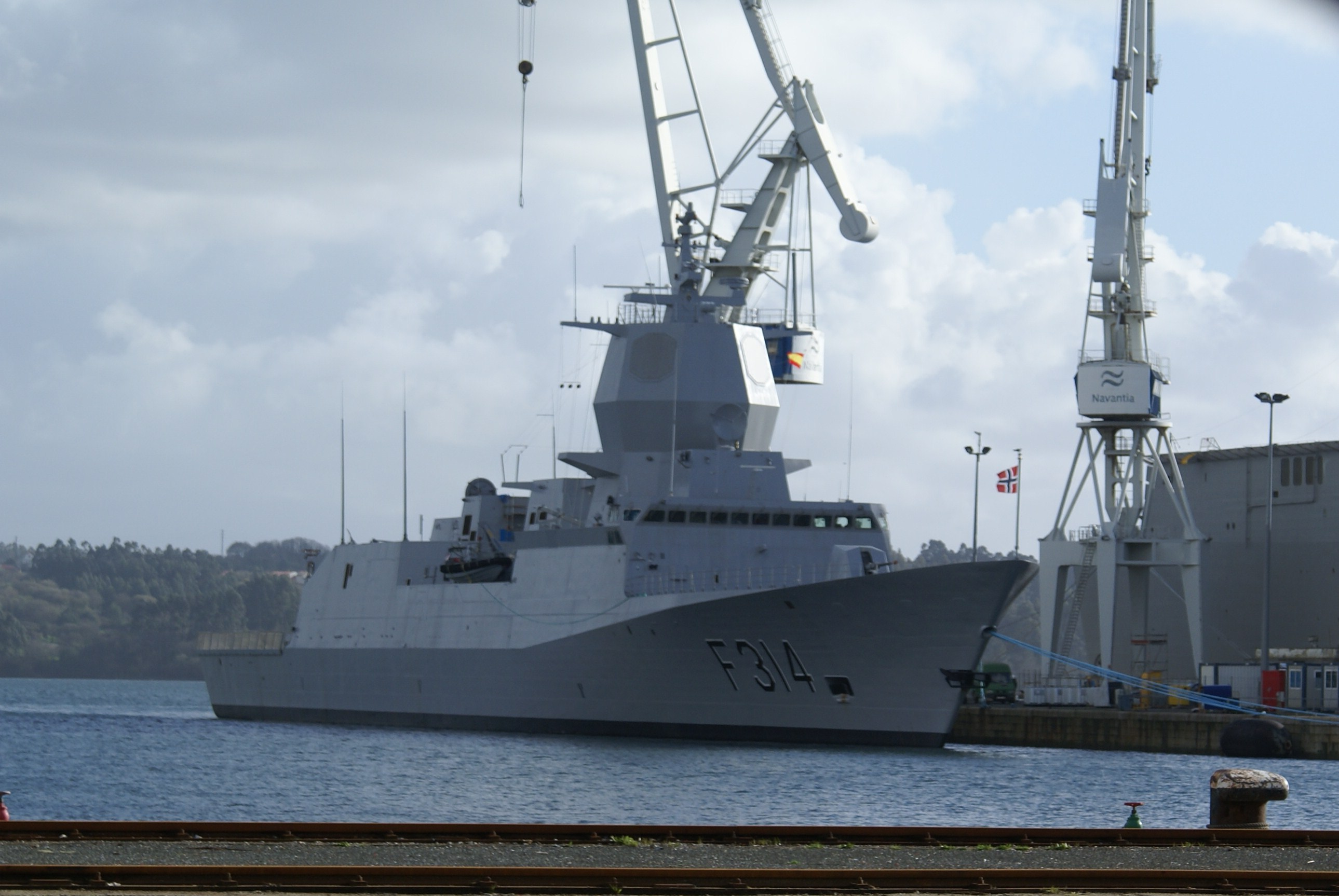 Fragata noruega Thor Heyerdahl (F-314), de clase Fridtjof Nansen